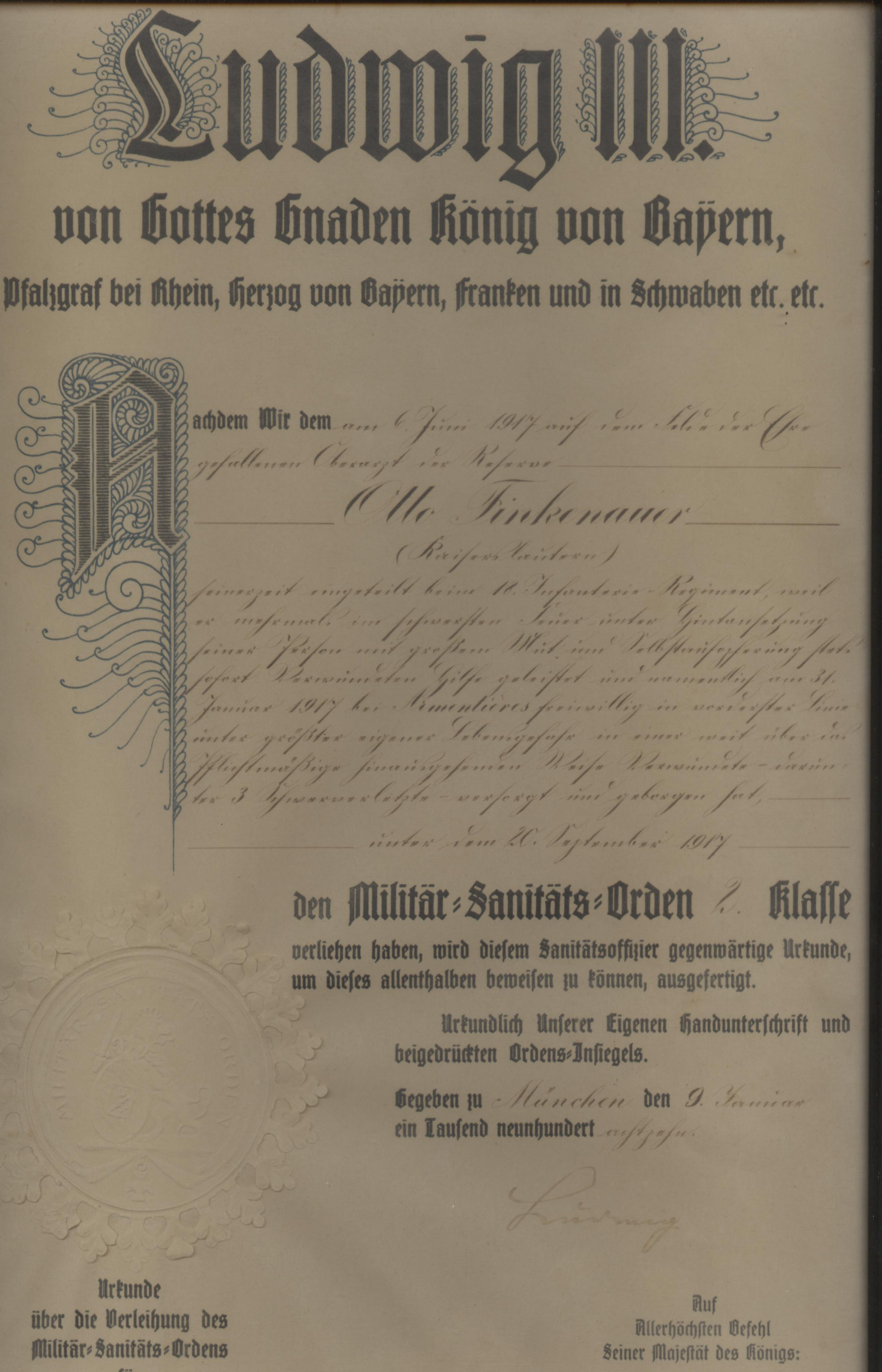 Bayerischer Militär Sanitätsorden Urkunde